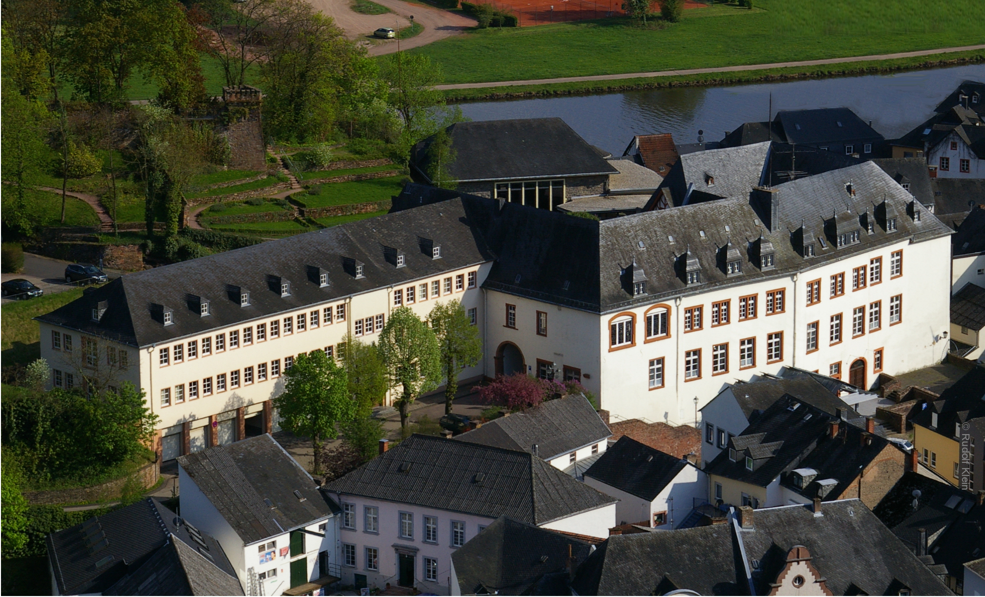 Warsberghaus Saarburg, Sitz der Verbandsgemeindeverwaltung Saarburg